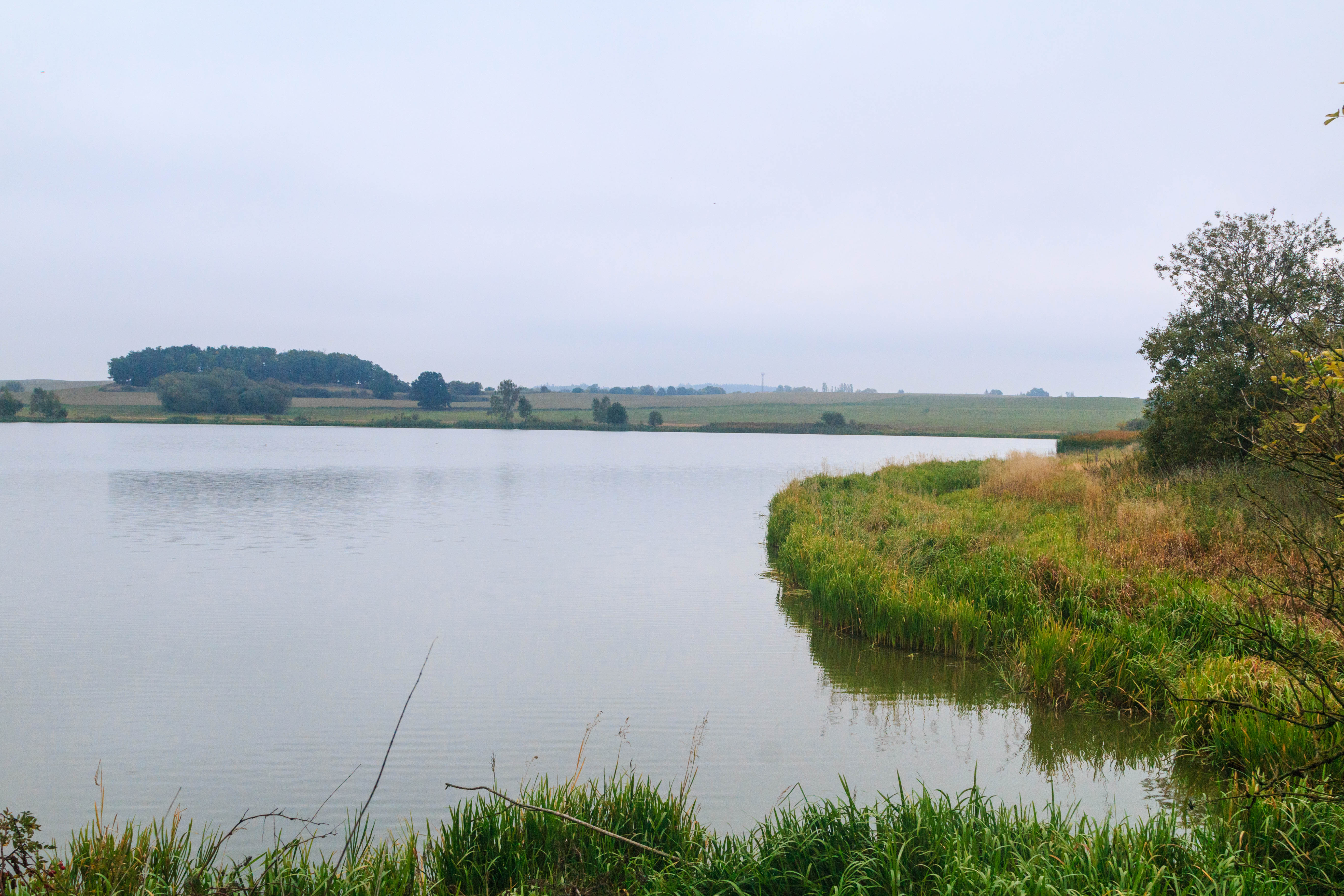 Rybník Mokrý u Čekanic Project: Vodstvo.